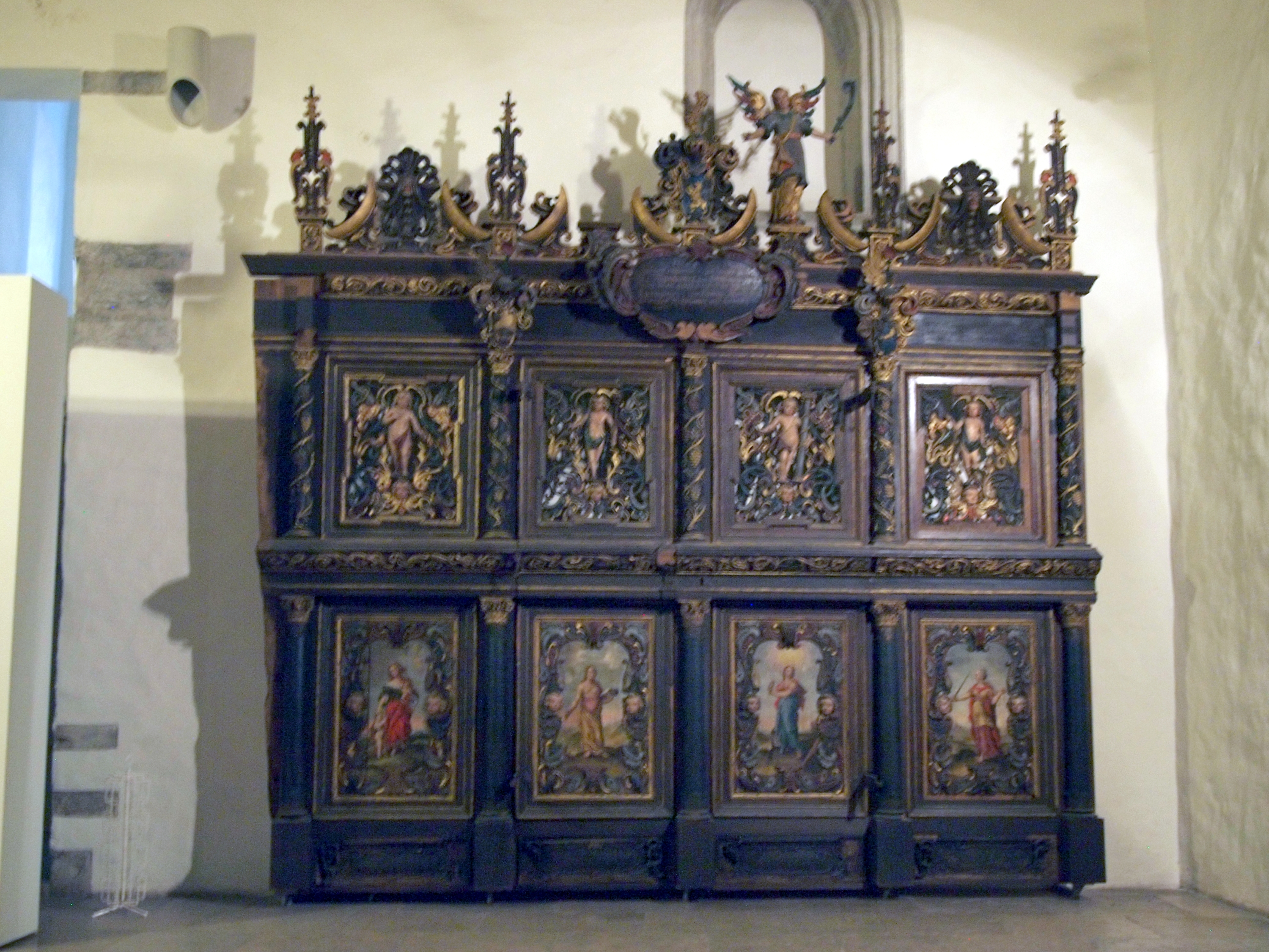 Roseni kabeli ehissein Niguliste kirikus